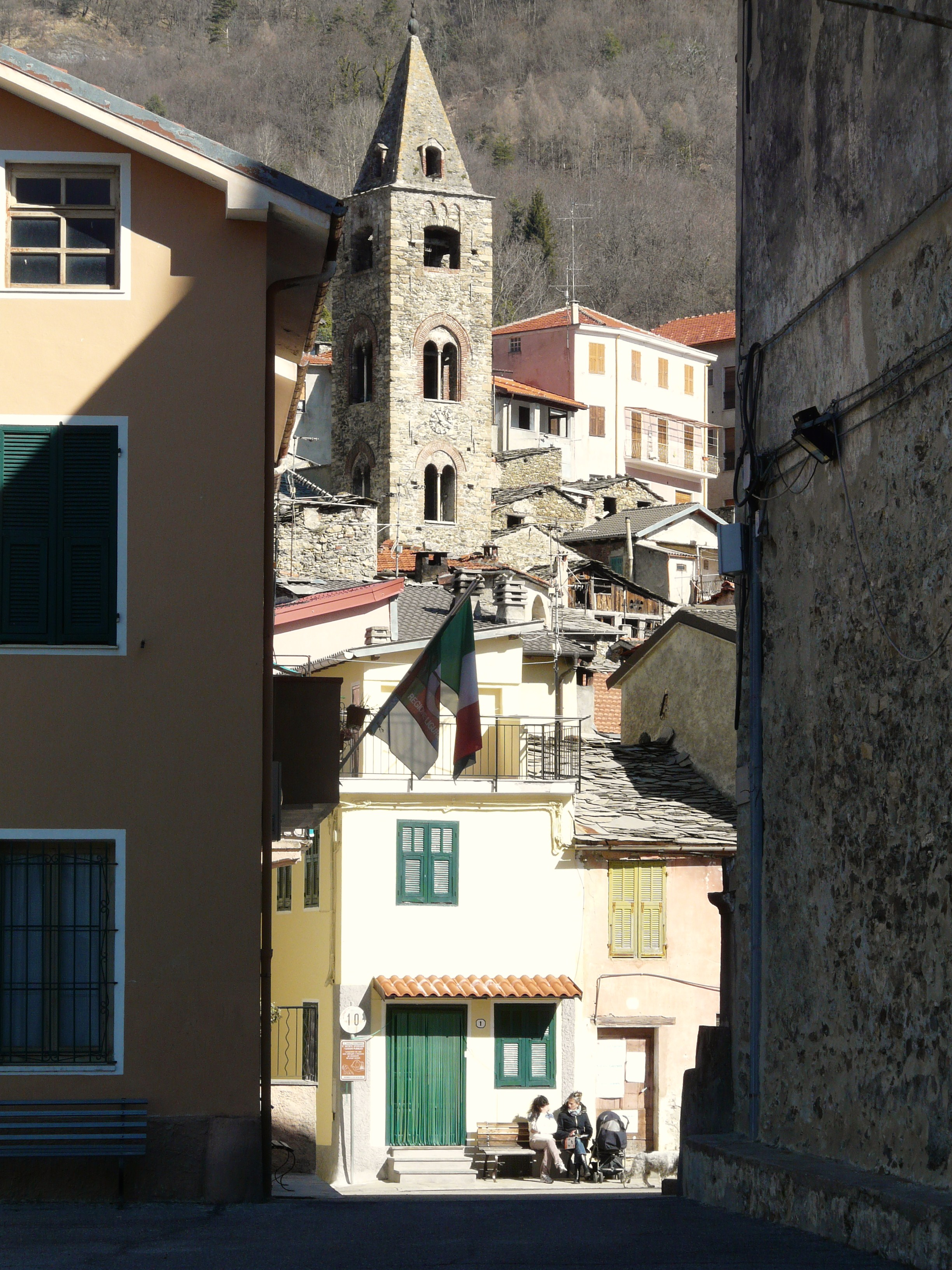 Cosio di Arroscia, Liguria, Italia